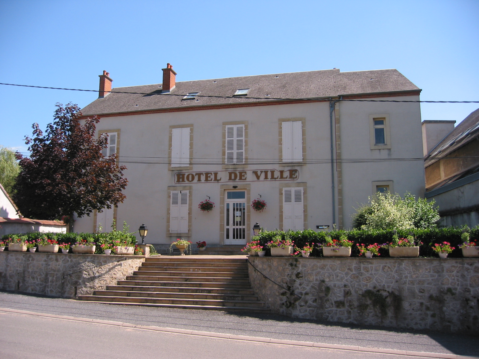 Hôtel de ville de Jaligny-sur-Besbre (France